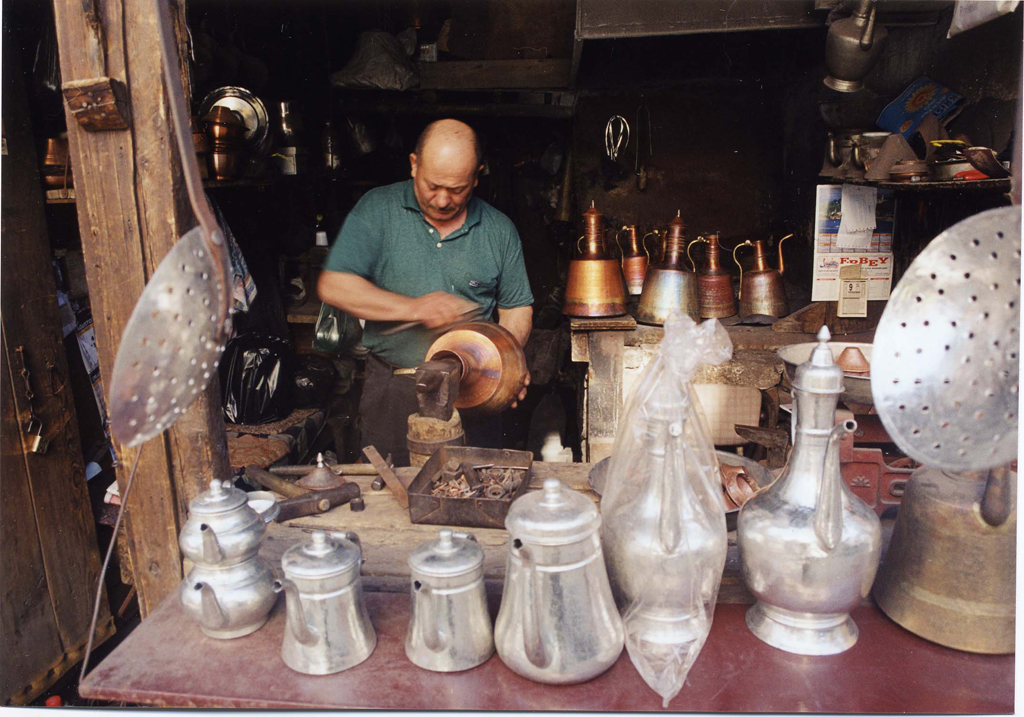 Beypazarı, Ankara